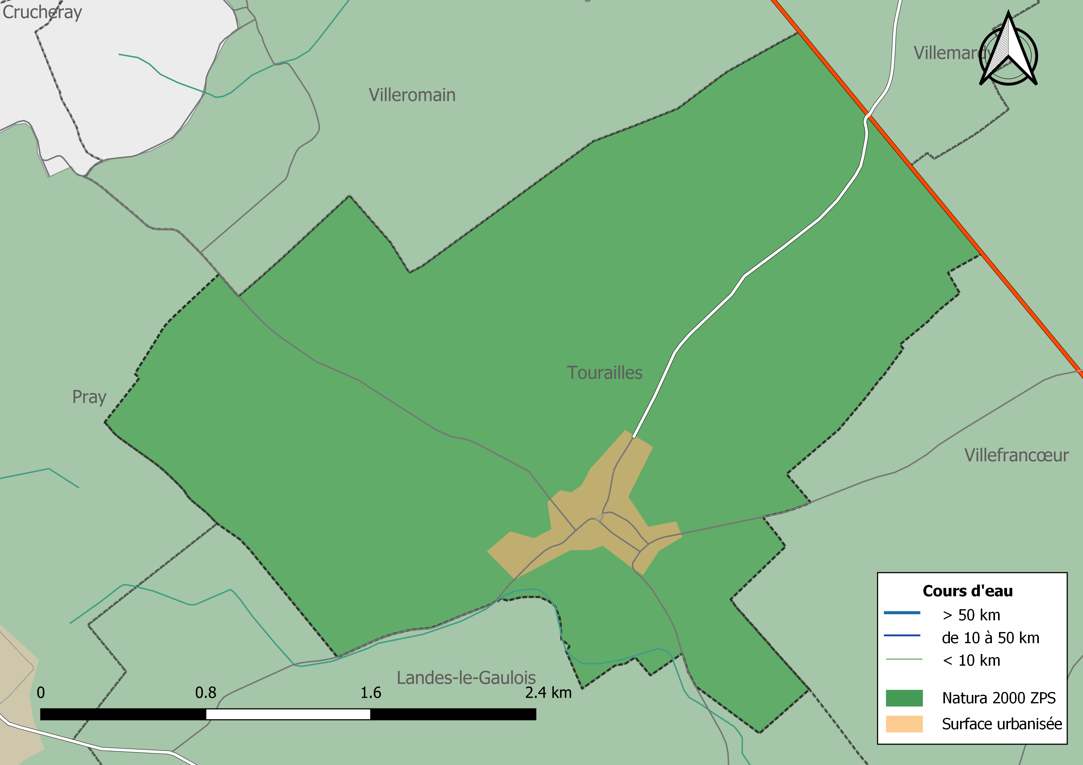 Carte du site Natura 2000 de type ZPS de la commune de Tourailles (France).